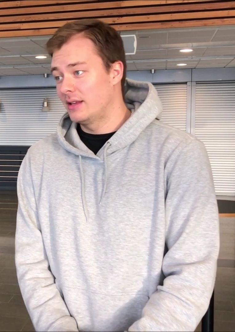 Håvard Åsheim i Arena Skövdes lobby